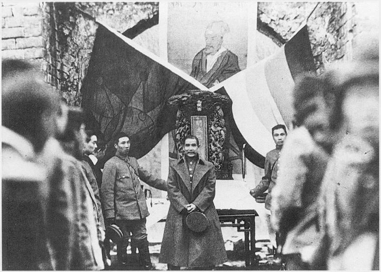 一九一二年二月十五日，孫中山先生祭明孝陵時向文武百官講話